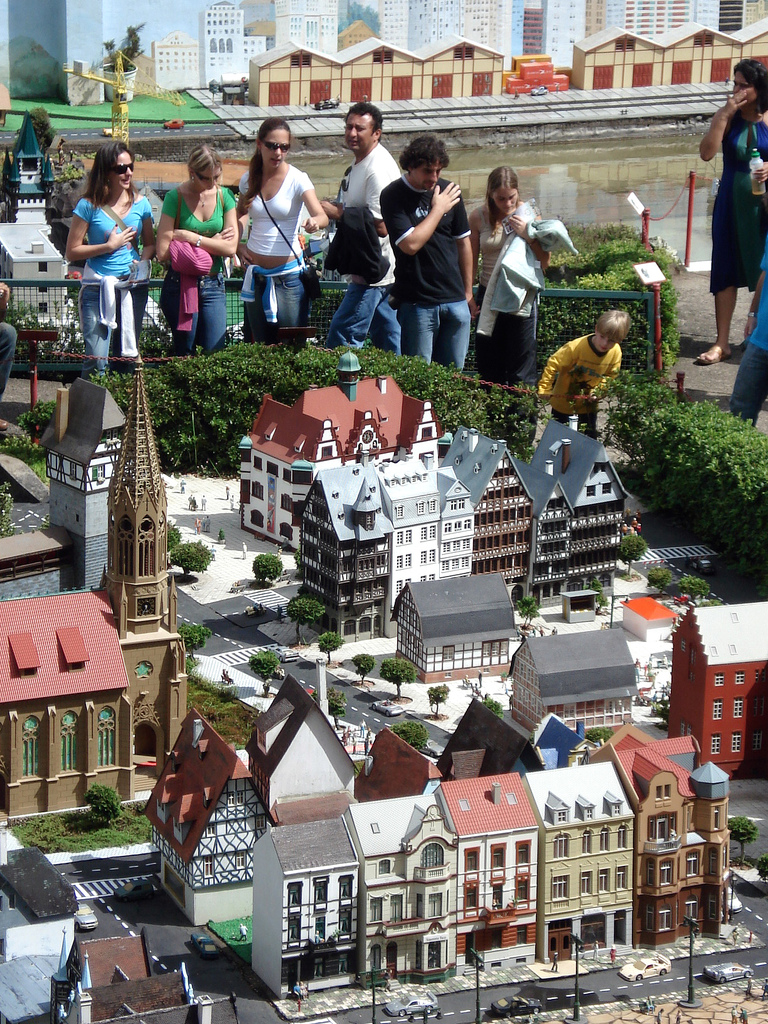 Mini Mundo em Gramado, RS, Brasil